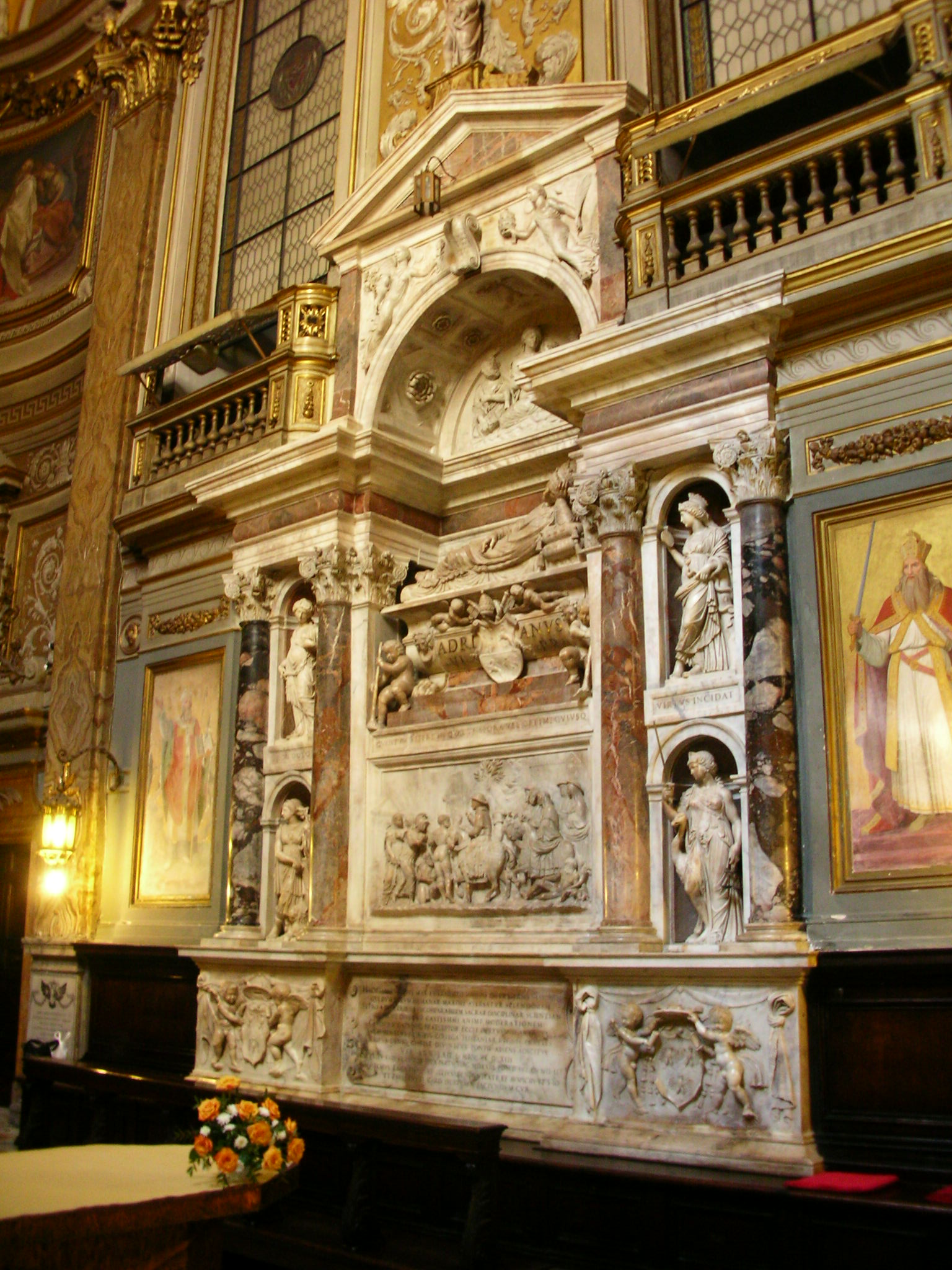 Tomb of Pope Adriano VI, by Baldassarre Peruzzi, Santa Maria dell'Anima, Rome